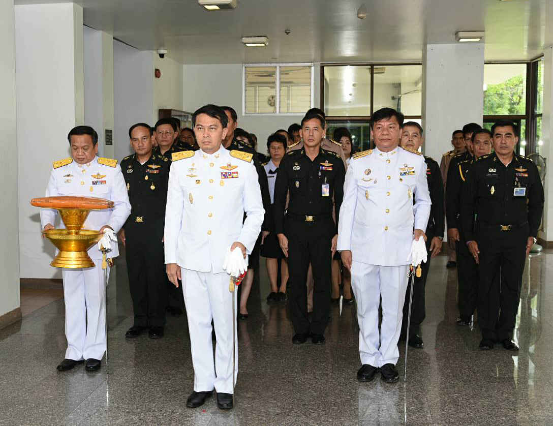 พลเอกประสูตร รัศมีแพทย์ รองผู้บัญชาการทหารสูงสุด